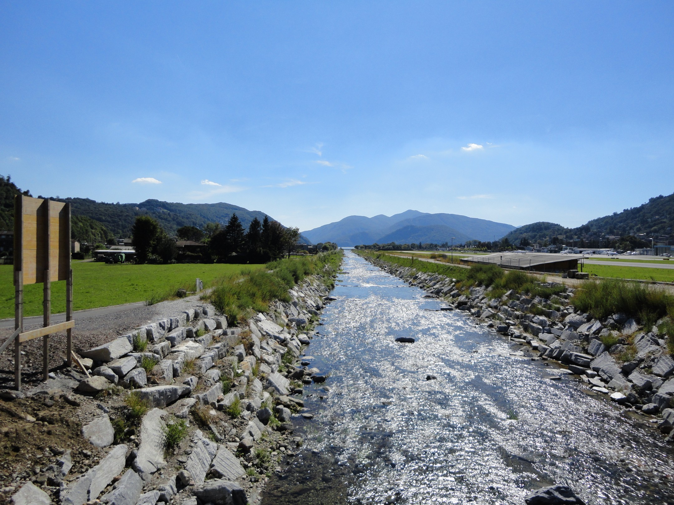 Il fiume Vedeggio ai Mulini di Bioggio, in fondo si scorge la foce.